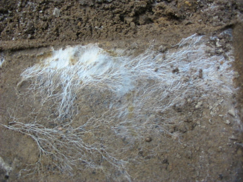 Categorie:Afbeelding plant